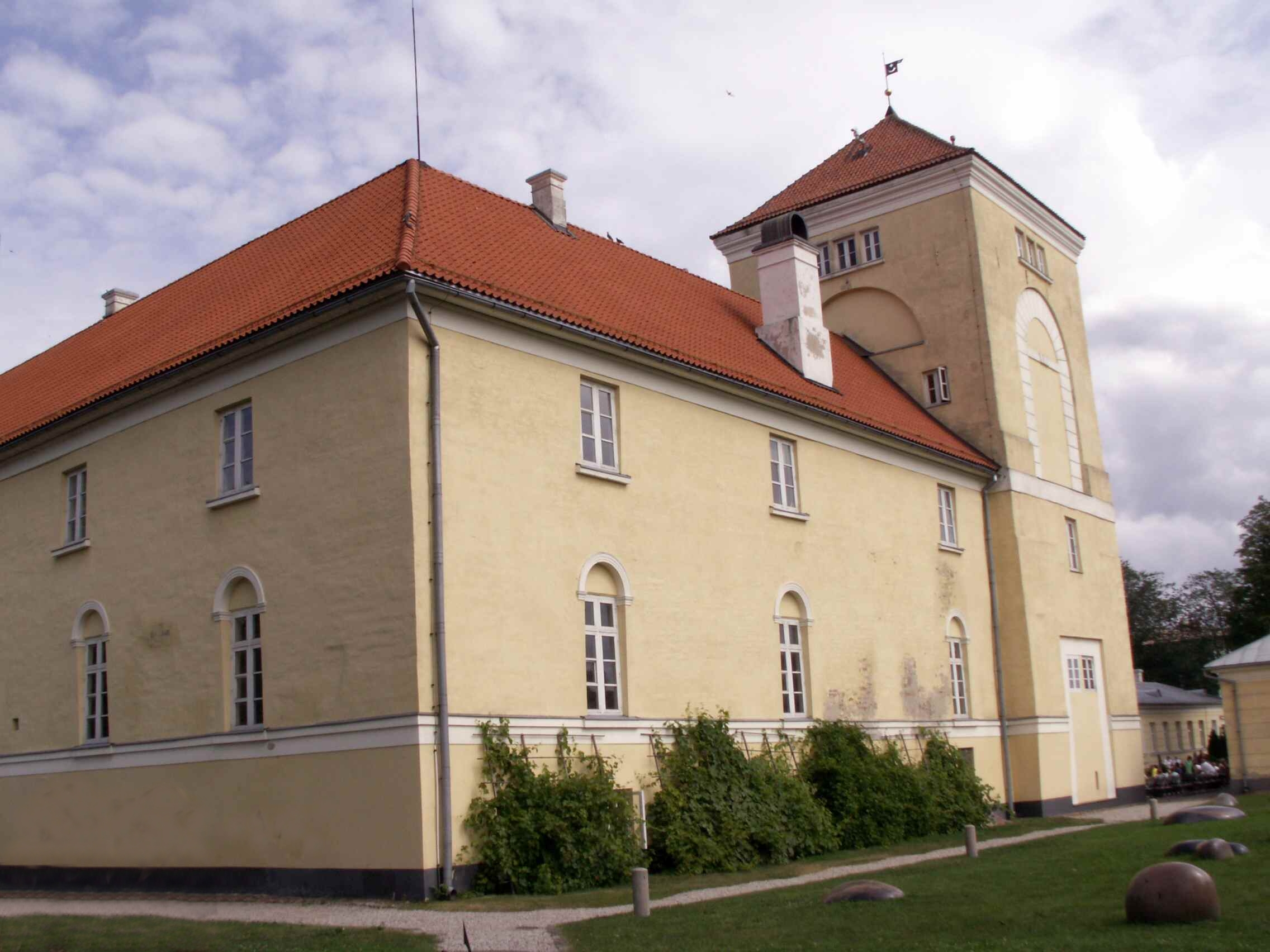 Ventspilio pilis